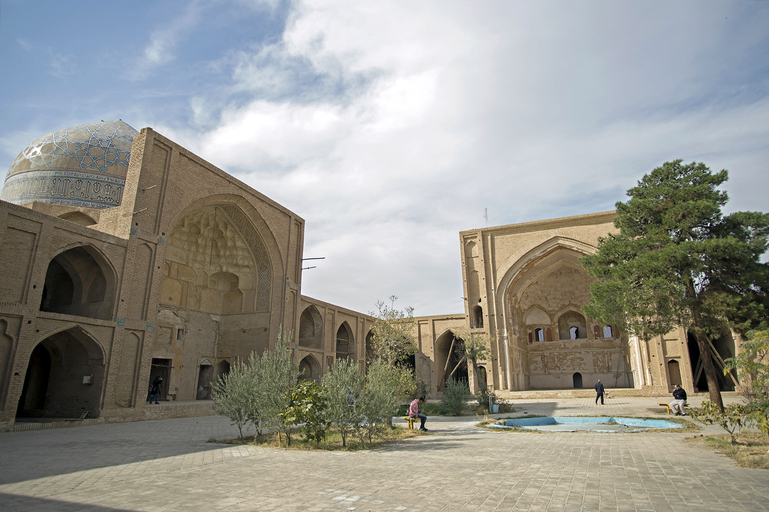 مسجد جامع ساوه